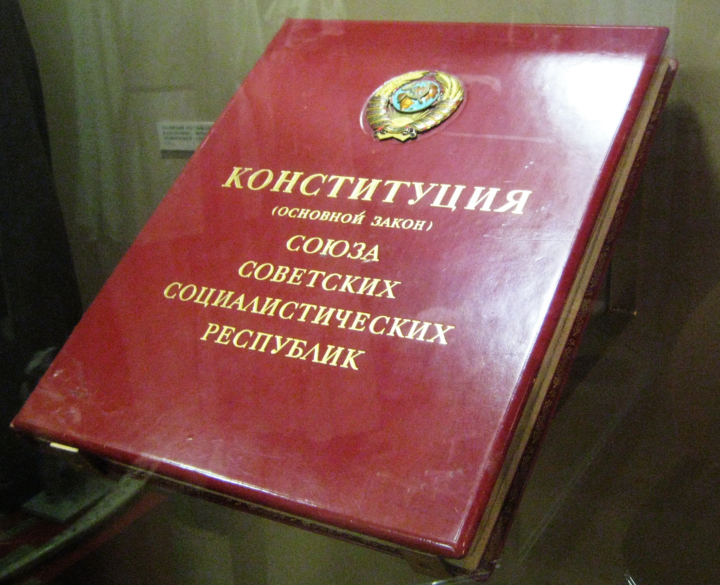 Государственный центральный музей современной истории России